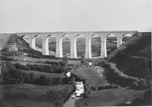 Le viaduc ferroviaire de la Penzé sur la ligne Paris-Brest (photo prise par Alfred Bernier entre 1862 et 1865)